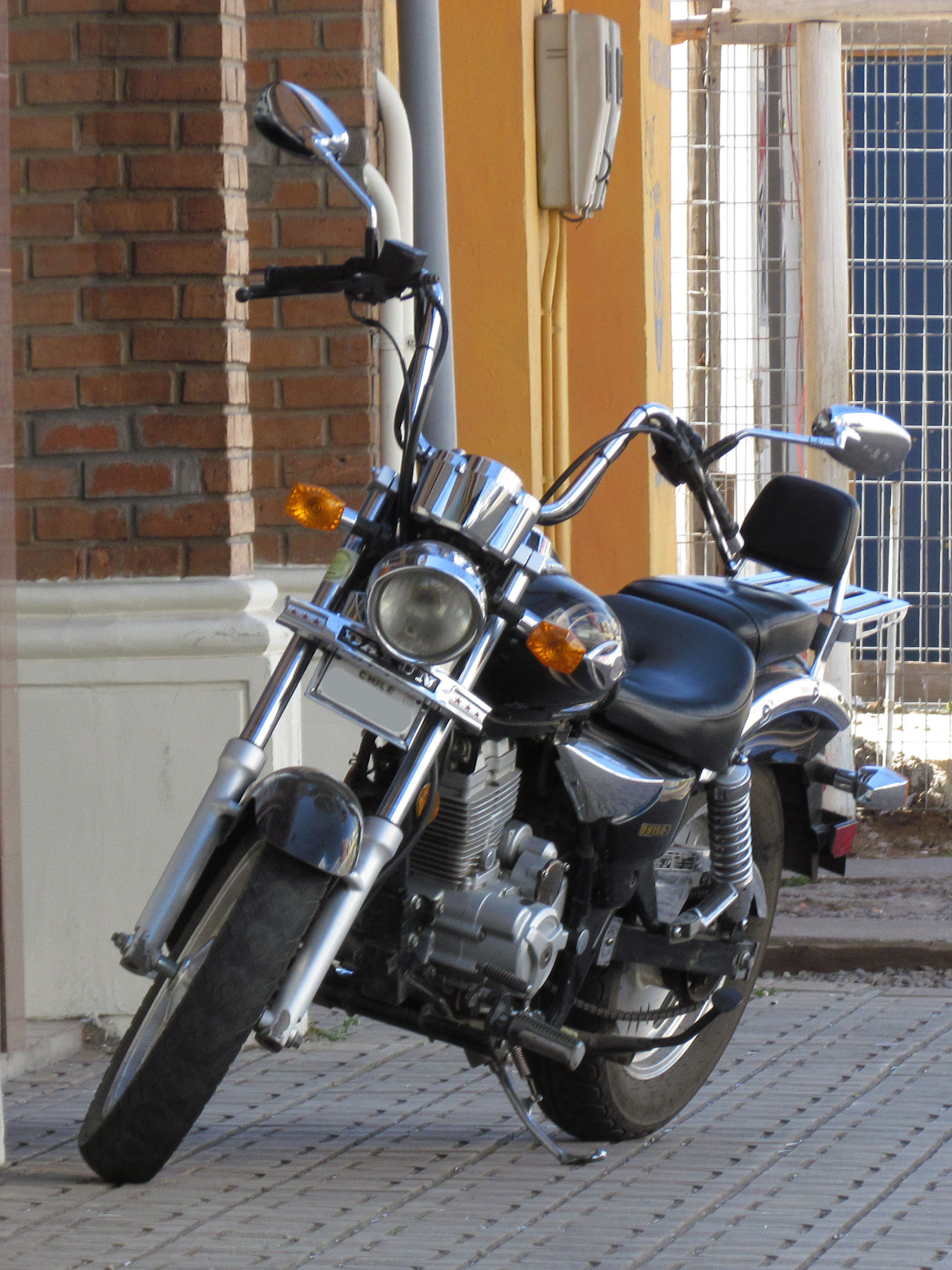 Dayun DY 150-7 2009